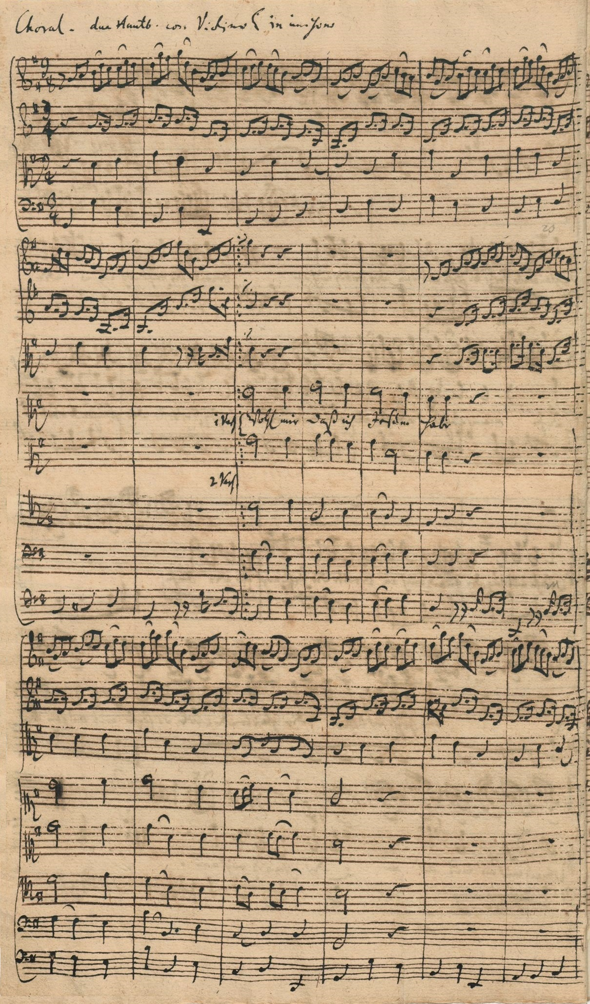 Johann Sebastian Bach, Anfang des Chorals Wohl mir, dass ich Jesum habe / Jesus bleibet meine Freude aus der Kantate BWV 147 Herz und Mund und Tat und Leben, Autograph